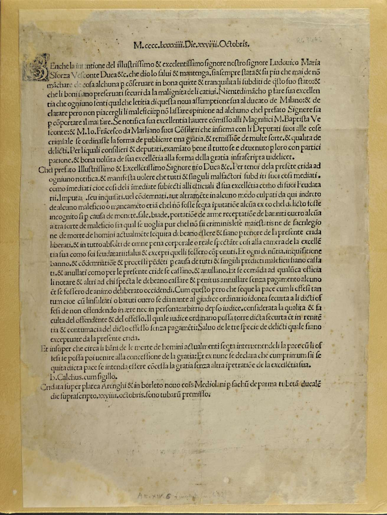 Frontespizio